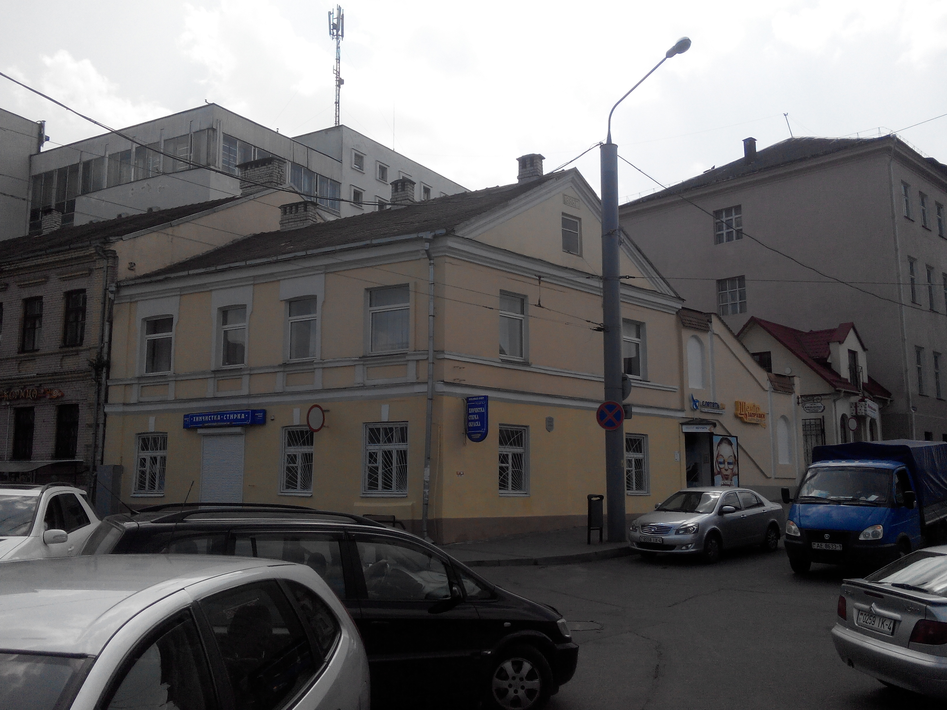 Будынак на вуліцы Вялікая Траецкая, 3, у Гродна, Беларусь